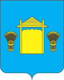 Герб Великих Бірків 1866 року